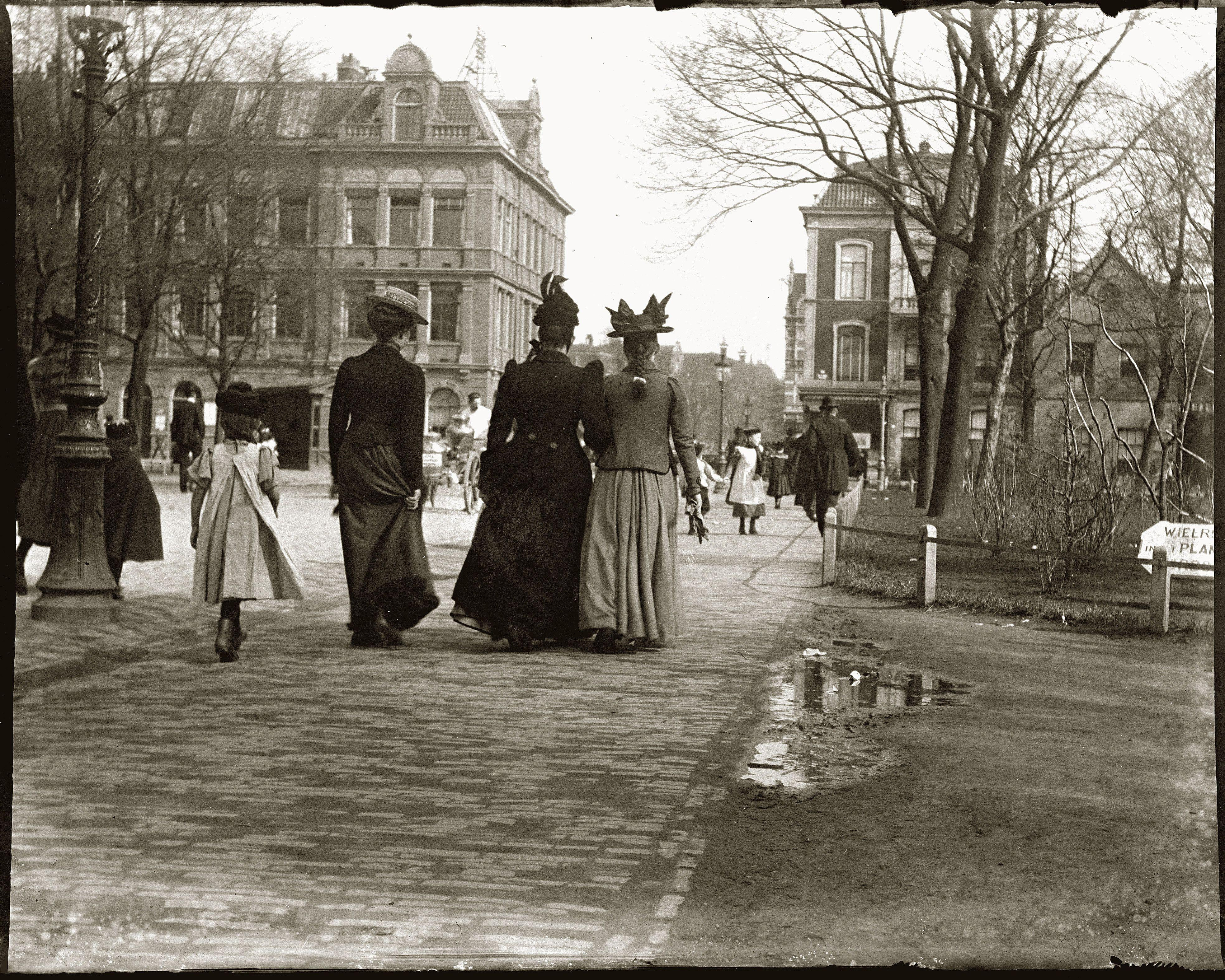 Beschrijving Tweede Weteringplantsoen, voorheen Weteringlaan. Gezien naar de Weteringschans en Nieuwe Vijzelstraat``, met links de Eerste HBS met driejarige cursus voor jongens``, Weteringschans 161``, en rechts de Eerste Ambachtschool (ged.)``, Weteringschans 165. Documenttype foto Vervaardiger Olie``, Jacob (1834-1905) Collectie Collectie Jacob Olie Jbz. Datering april 1902 Geografische naam Tweede Weteringplantsoen Inventarissen Afbeeldingsbestand 10019A000760